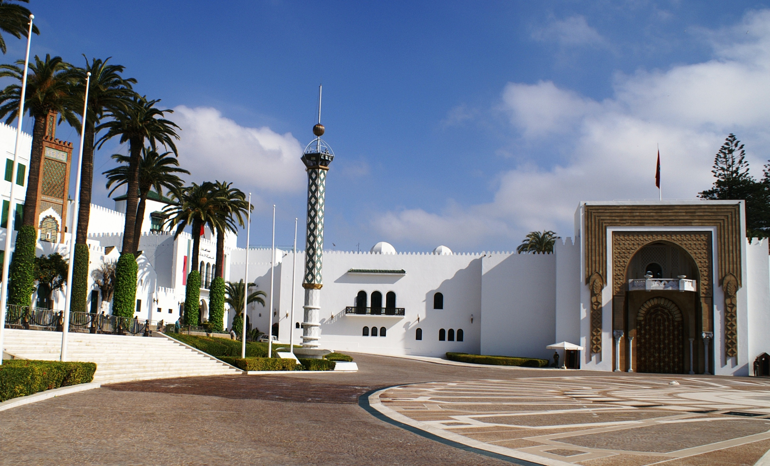 Marokko Tetouan